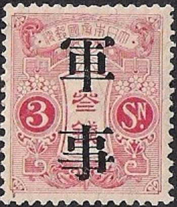 日本軍が兵士に支給した軍事切手のうち、大正年間に発行したもの。いわゆる大正毛紙切手に文字を重ねたもの。